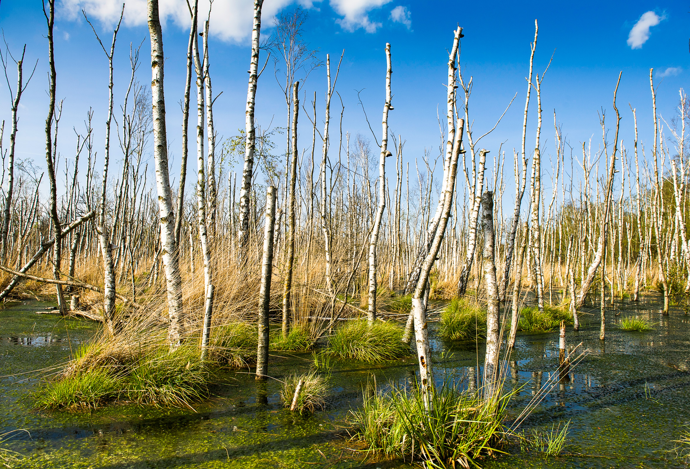 Nationalpark Vorpommersche Boddenlandschaft in Mecklenburg Vorpommen: Das Foto zeigt einen abgestorbenen Birkenwaldbereich, der durch Wiedervernässung entstanden ist, in Ost-Zingst, nördlich der Sundischen Wiesen.